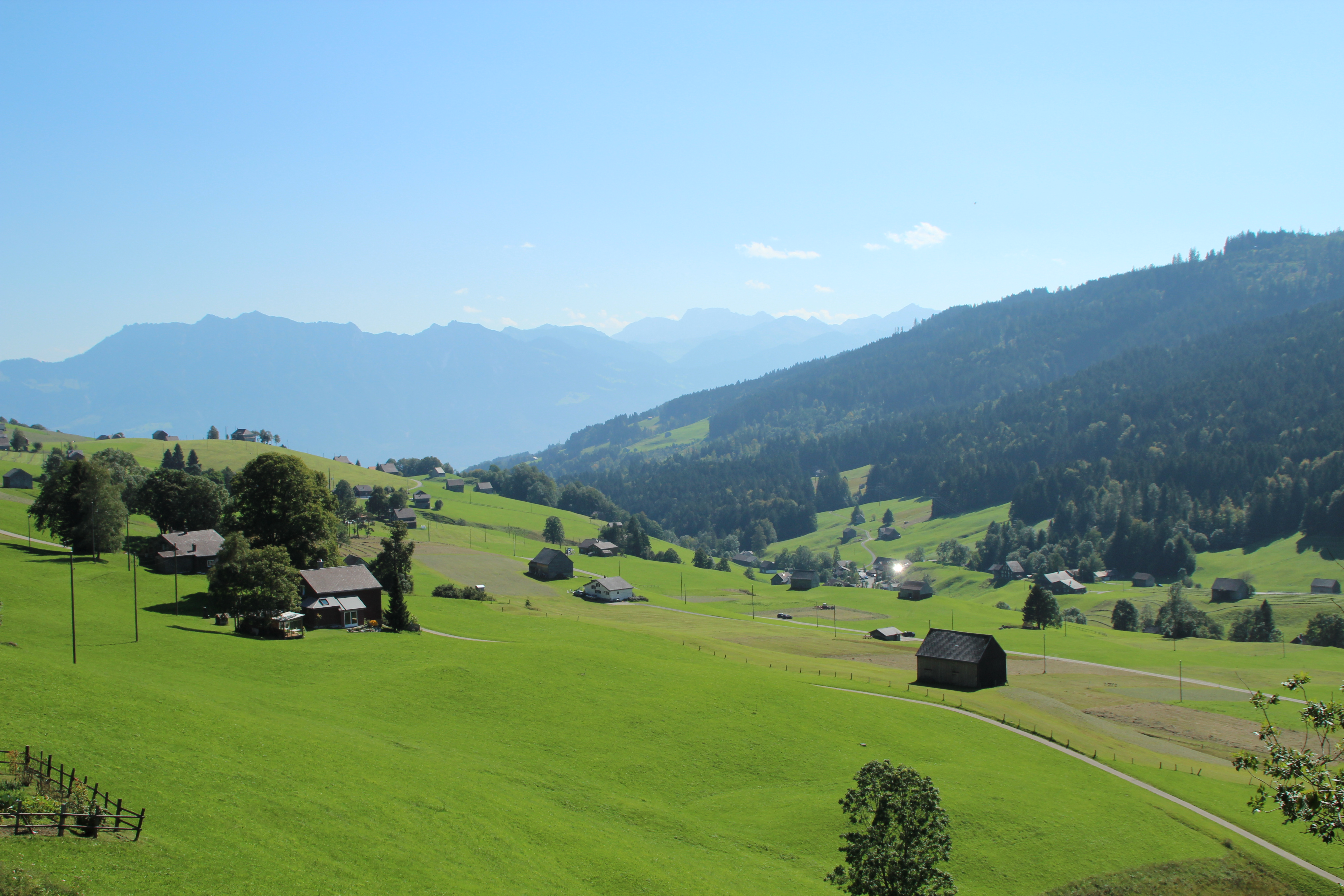 Ostende des Toggenburg bei Wildhaus vor dem Gefälle in das Rheintal